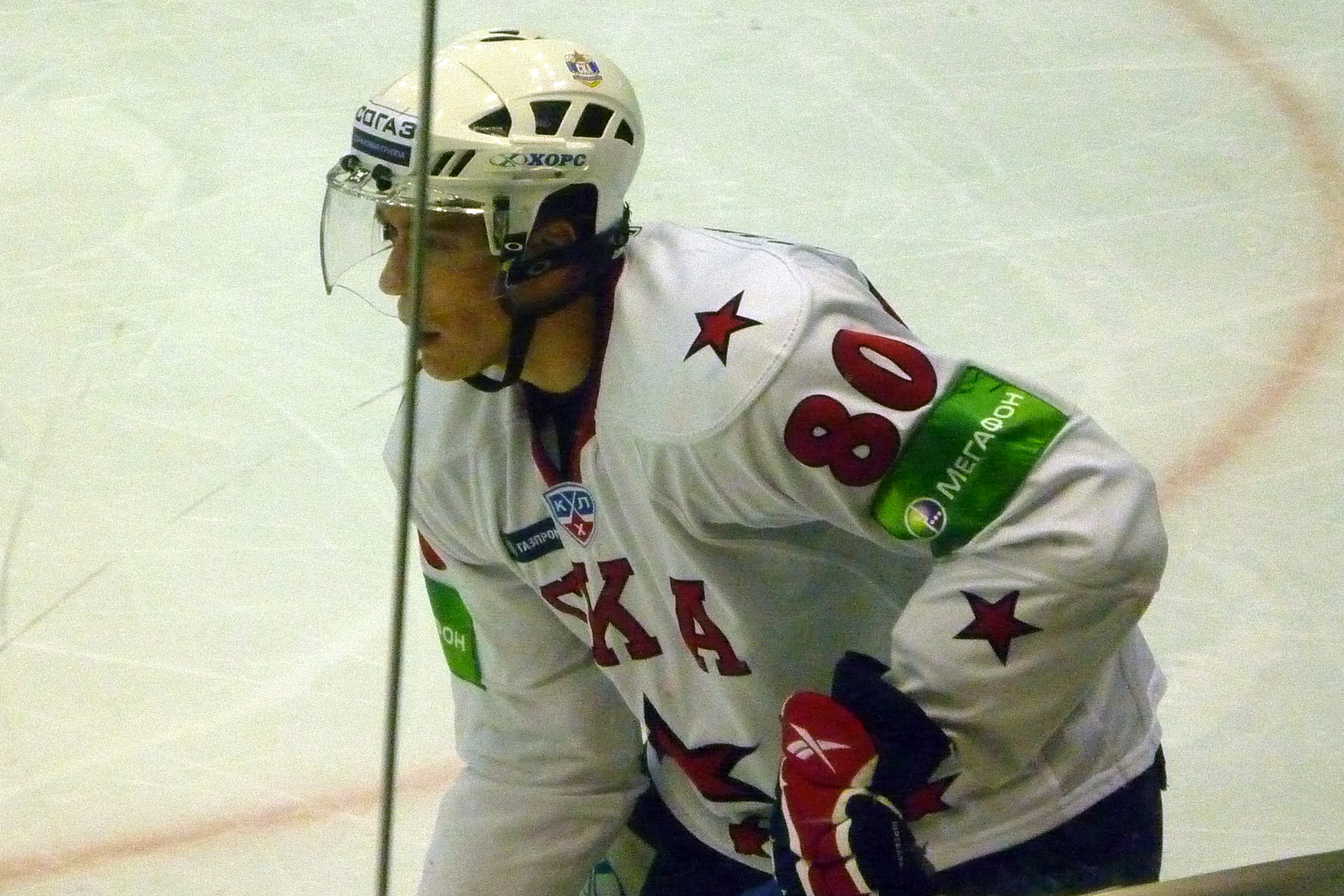 Нападающий питерского СКА Маттиас Вейнхандль в матче против нижегородского «Торпедо» 12 декабря 2010